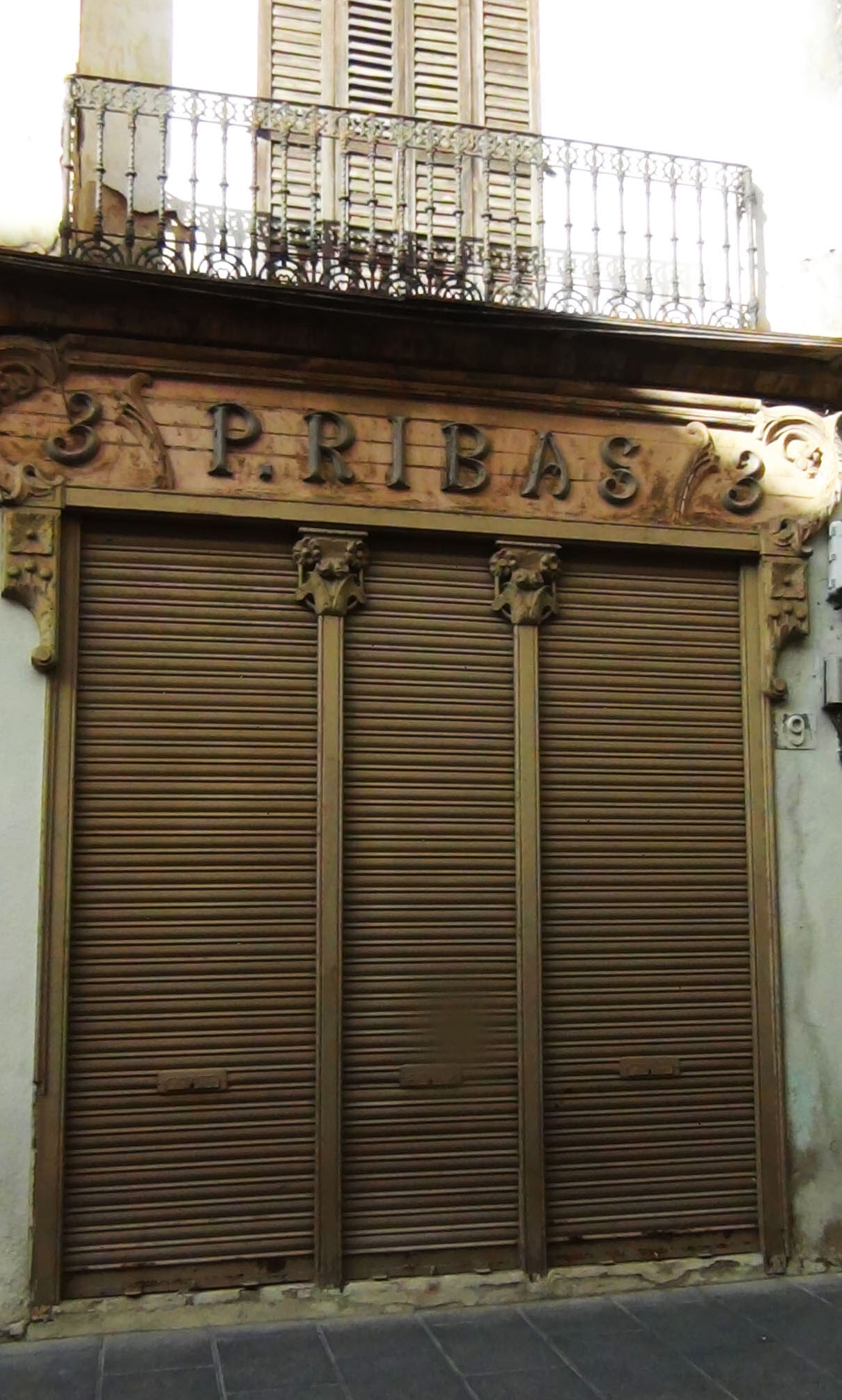 Façana de la emprenta Ribas , inclosa al Patrimoni arquitectònic de Palafrugell